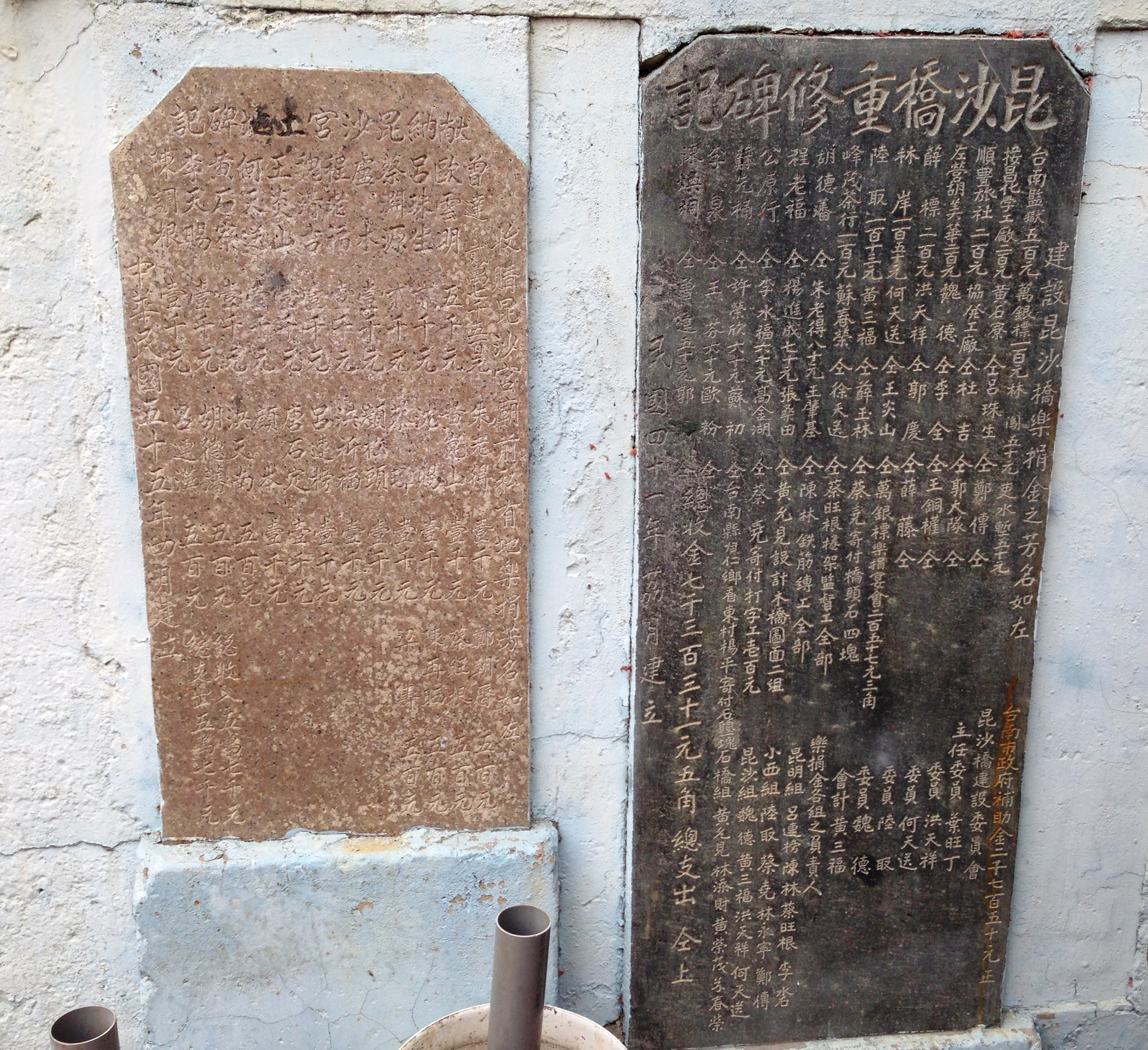 中文（台灣）: 昆沙宮的石碑